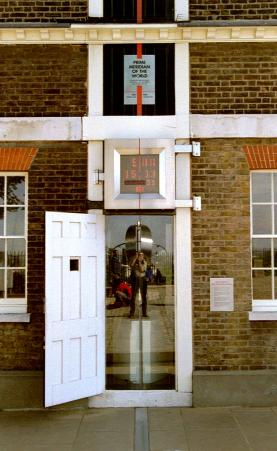 Nullmeridian in Greenwich, das Bild ist von mir selbst aufgenommen --mw 10:24, 12. Okt 2004 (CEST)